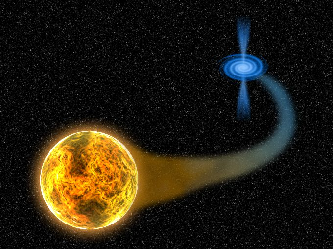 Čierna diera Zdroj: Dátum: 17.12.2006 Autor: Marek Šafárik Povolenie: Freeware Iné verzie tohto súboru: Nie